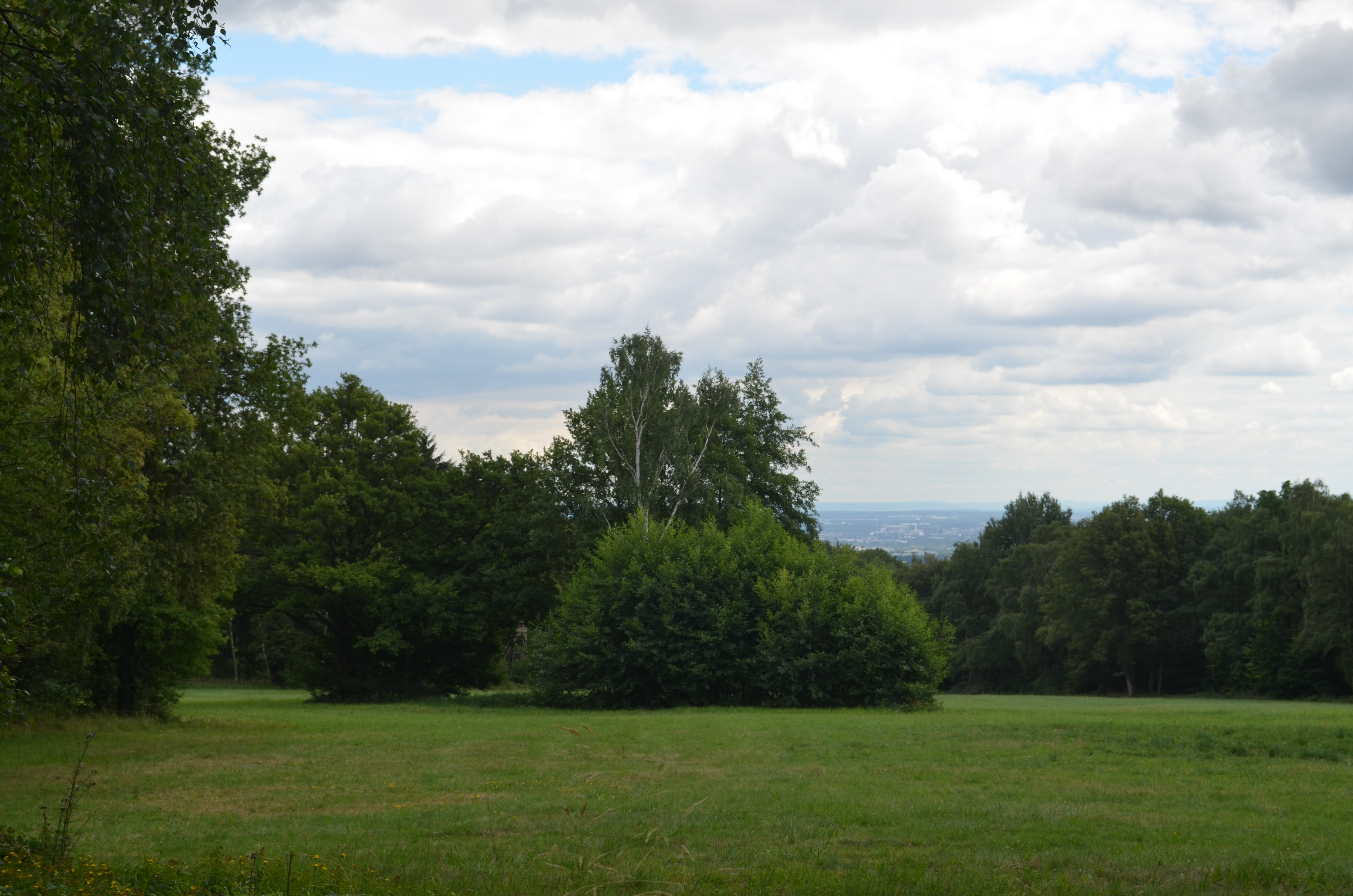 Hünerbergwiesen von Oberursel